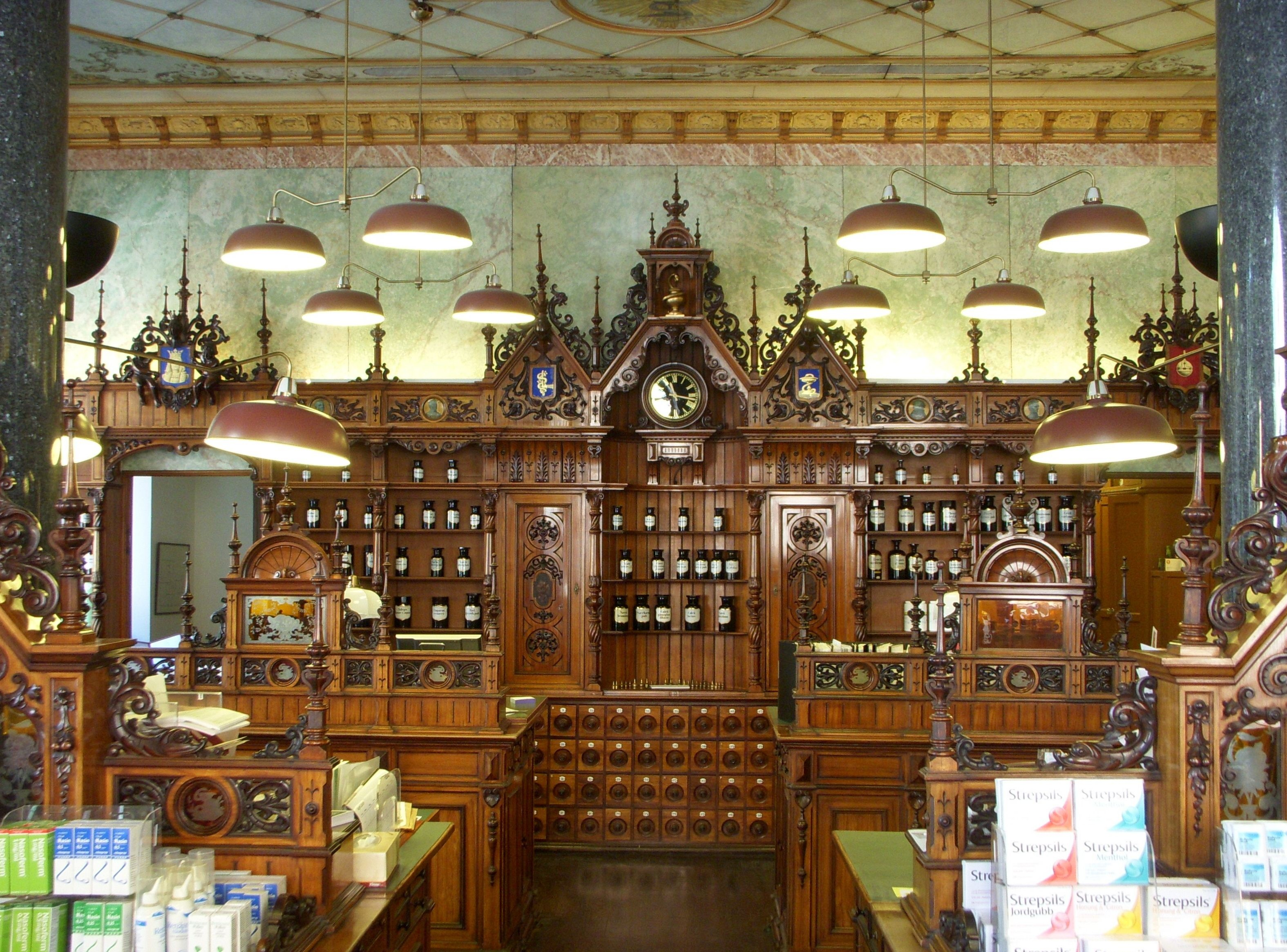 Apoteket Storken på Östermalm, Stockholm